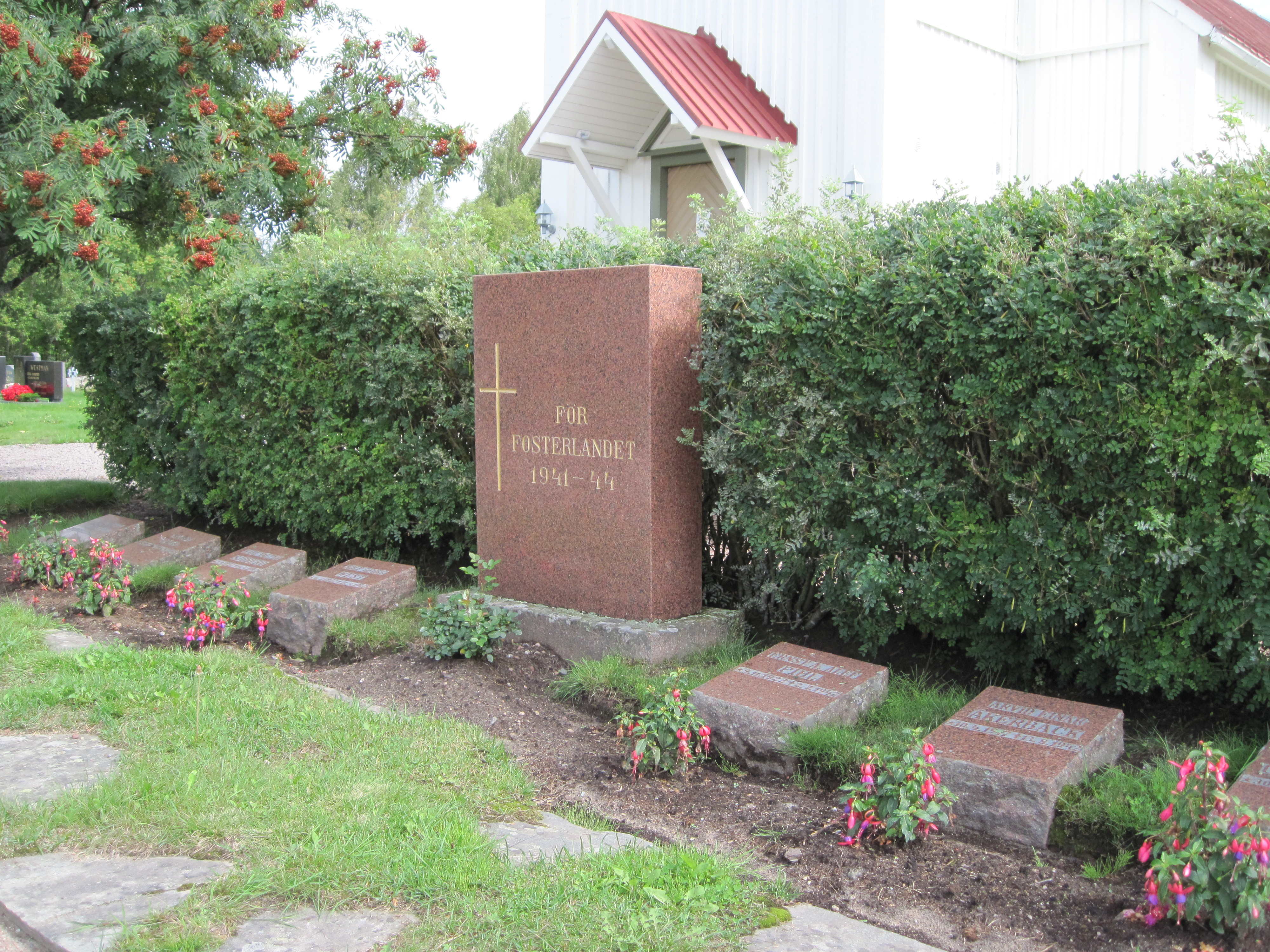 Bergö:n kirkon sankarihaudat kesällä 2010